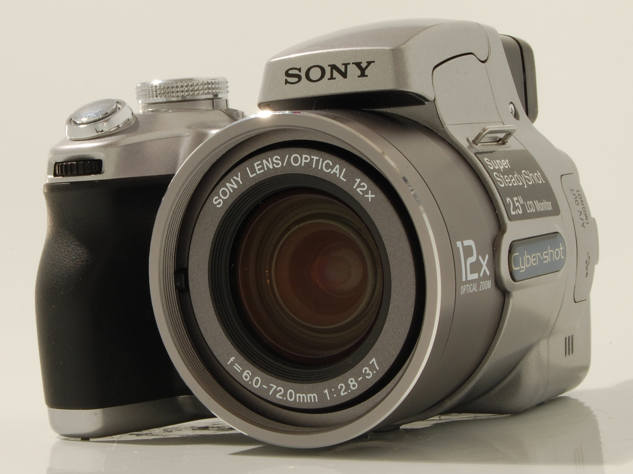 Sony DSC H1 (5.1 megapixel, 12x optical zoom)